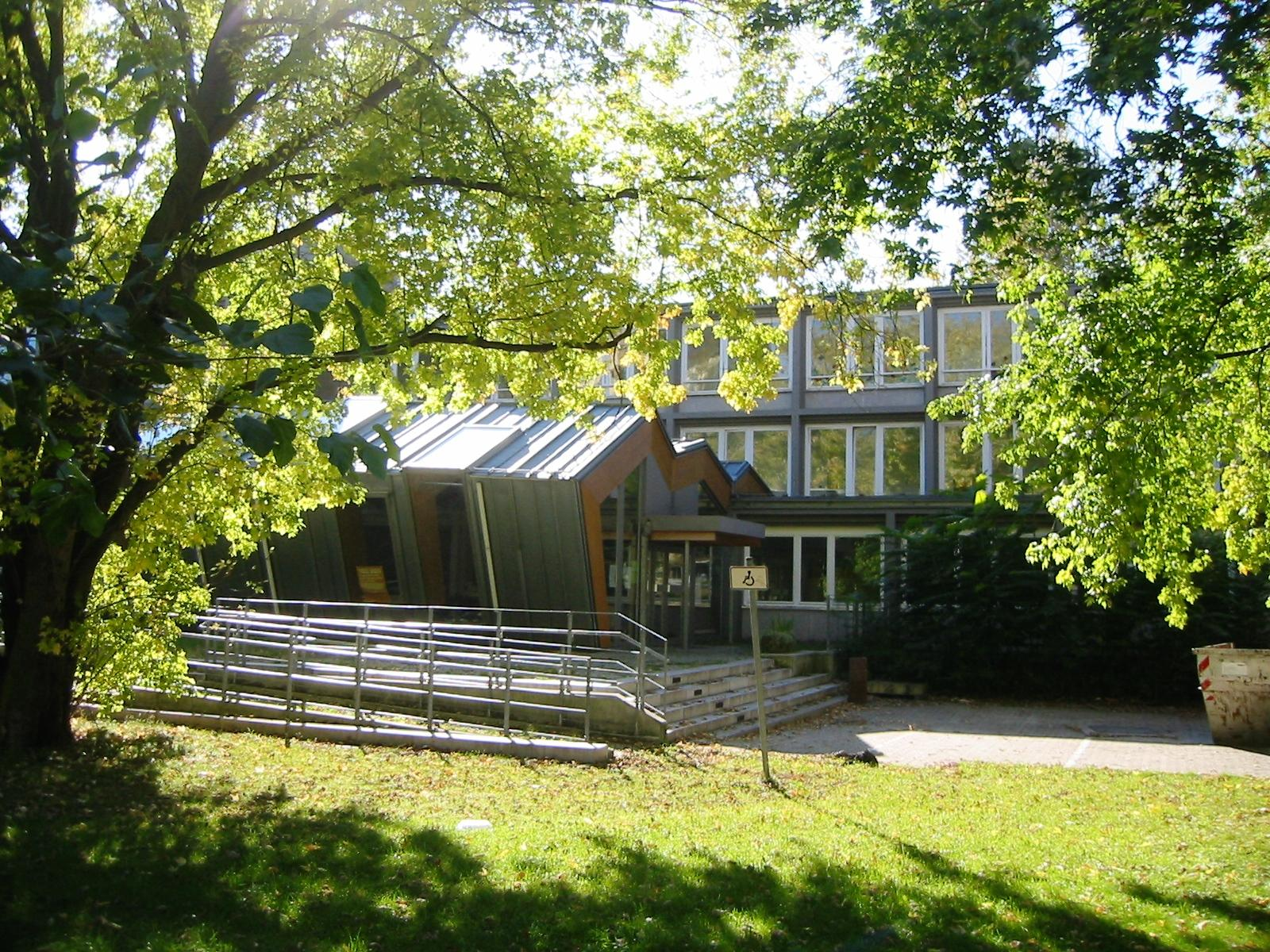 Ehemaliges Hauptkinderheim in der Ritterstraße in Berlin-Kreuzberg. Das Heim war das letzte Projekt von Max Taut. Nach Umbau und Sanierung befindet sich in dem Gebäude eine Waldorfschule.